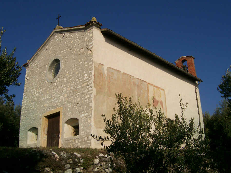 Chiesetta di San Pietro in Brian - Comune di Cazzano di Tramigna